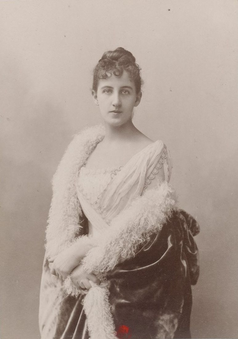 Lucie Manvel, photographie, tirage de démonstration, Atelier Nadar